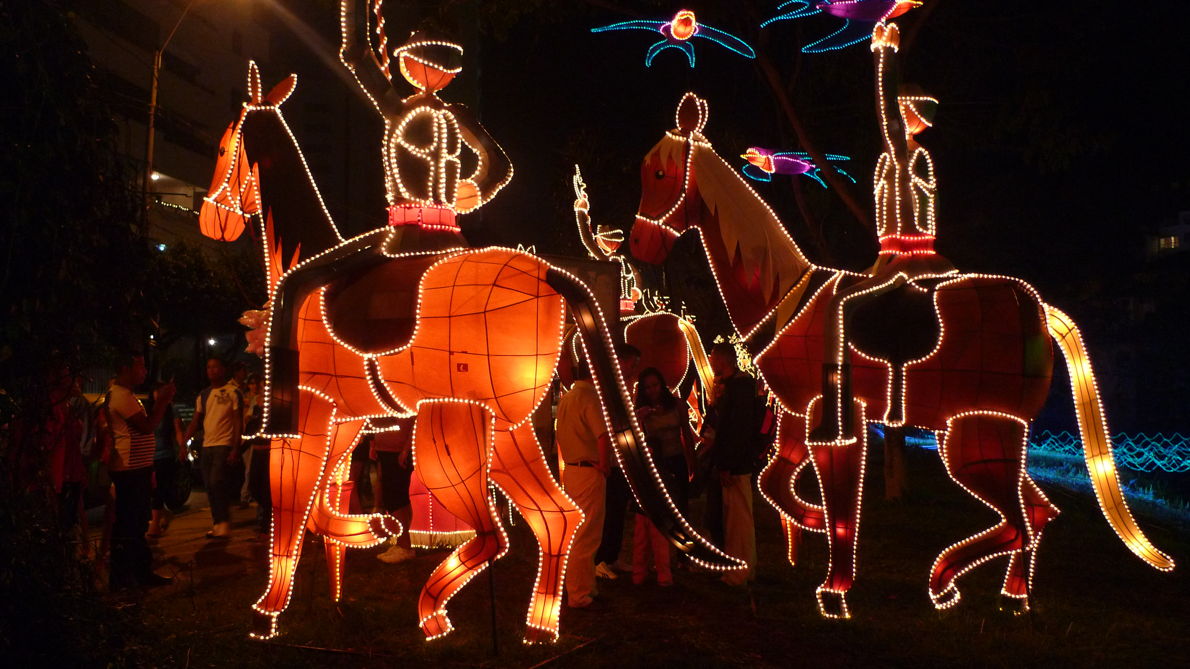 Fotografía por: Lizardo Carvajal